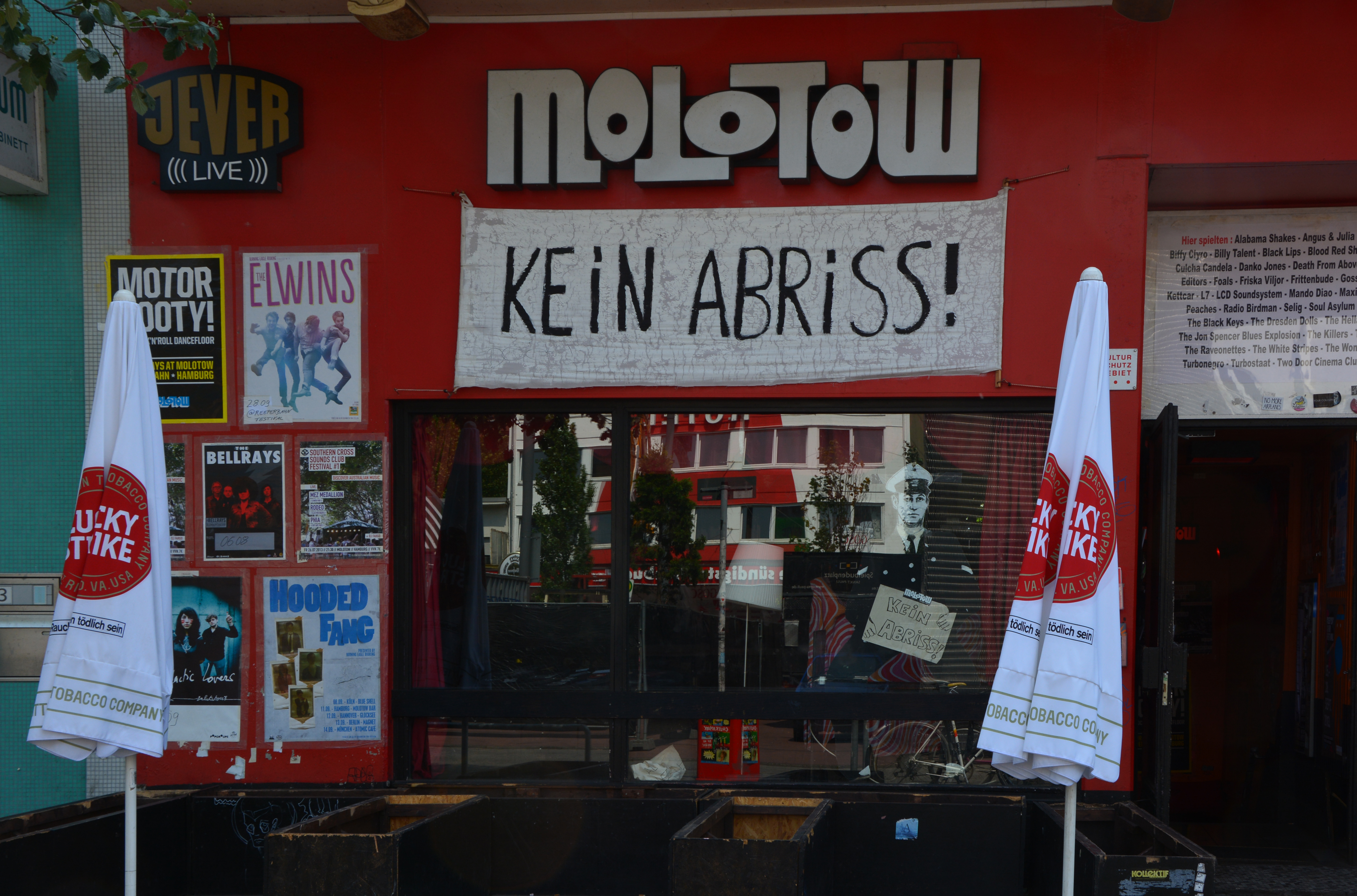 Das Molotow auf dem Spielbudenplatz in Hamburg-St.Pauli